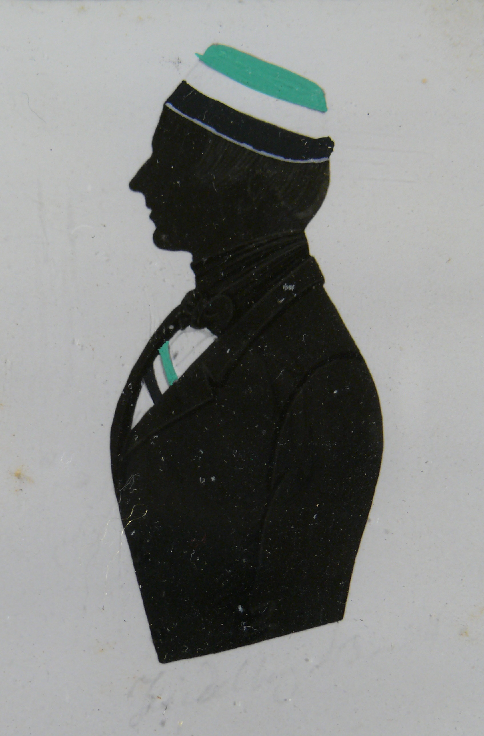 Silhouette von Graf Eduard von Baudissin (1823-1883)